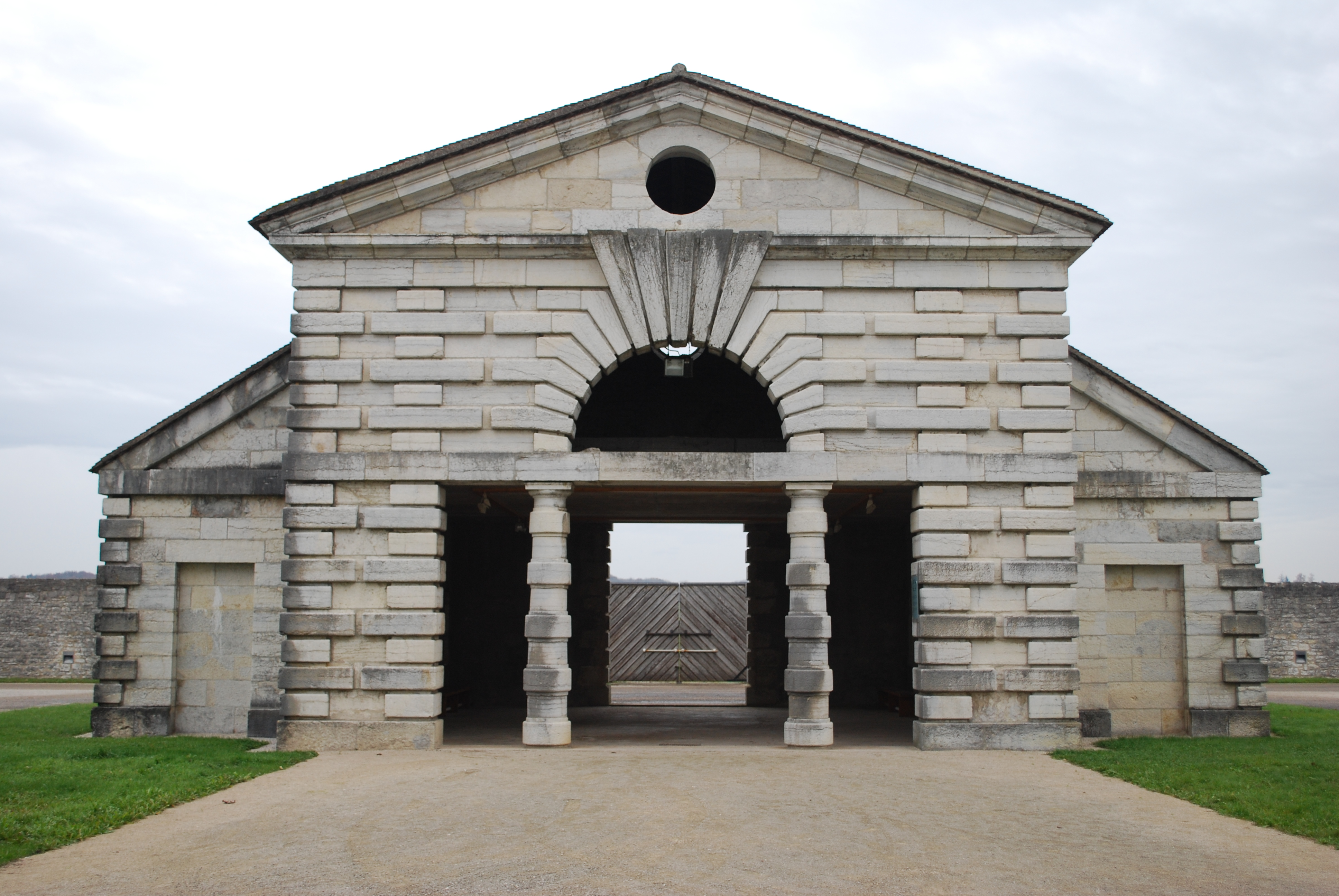 Remise et écuries du directeur de la saline royale d'Arc-et-Senans. .